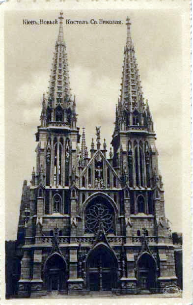 Романо-католицький костел Святого Миколая. Романо-католицький костел Святого Миколая, листівка царських часів (до 1917 року).